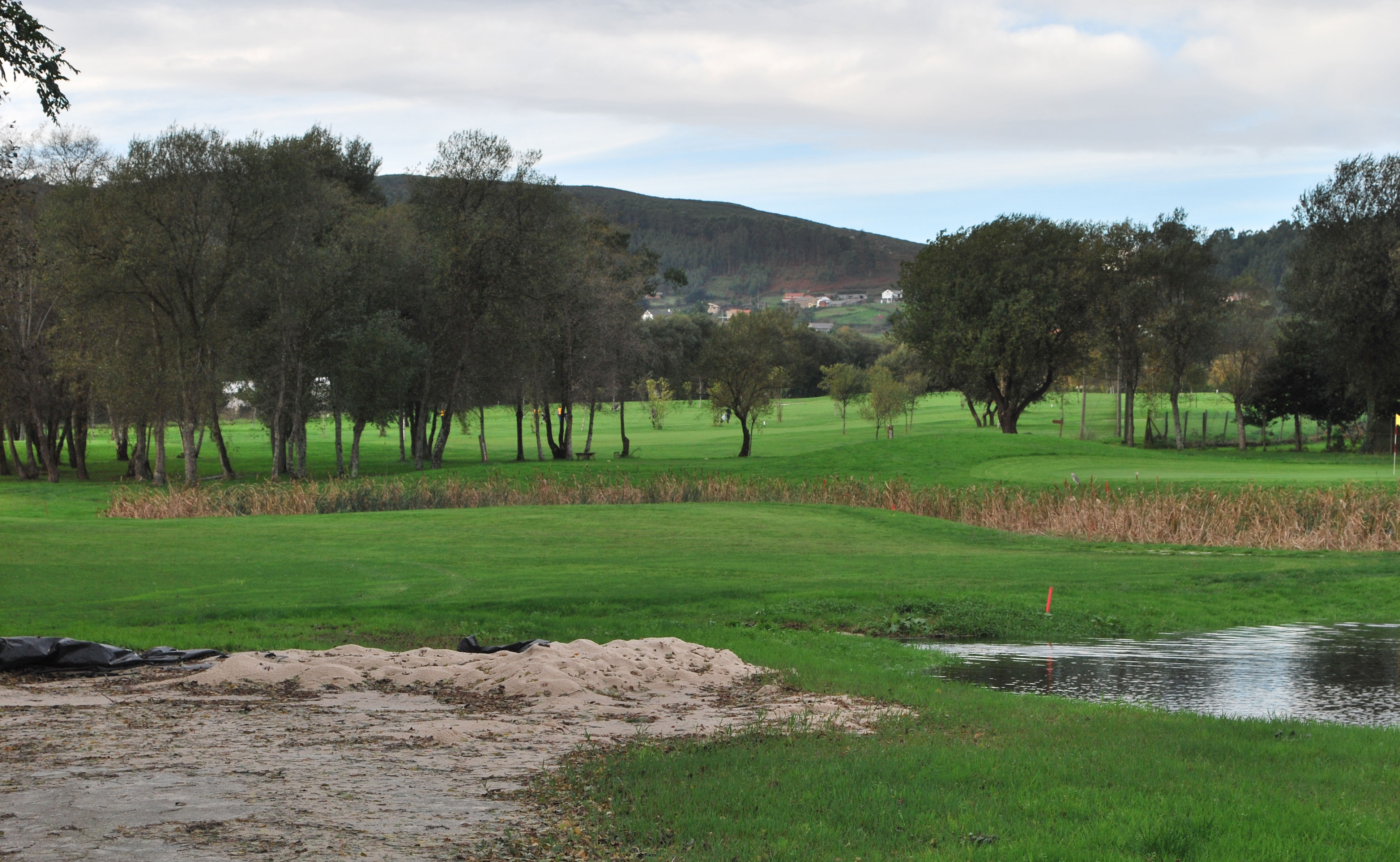 Campo de Golf de Meirás, Narón A Coruña Spain